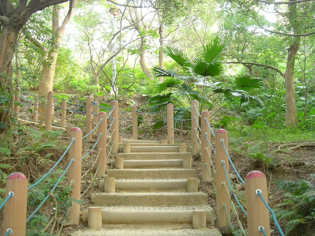 中和市饅頭山(圓山、自強公園)的登山階梯與蒲葵